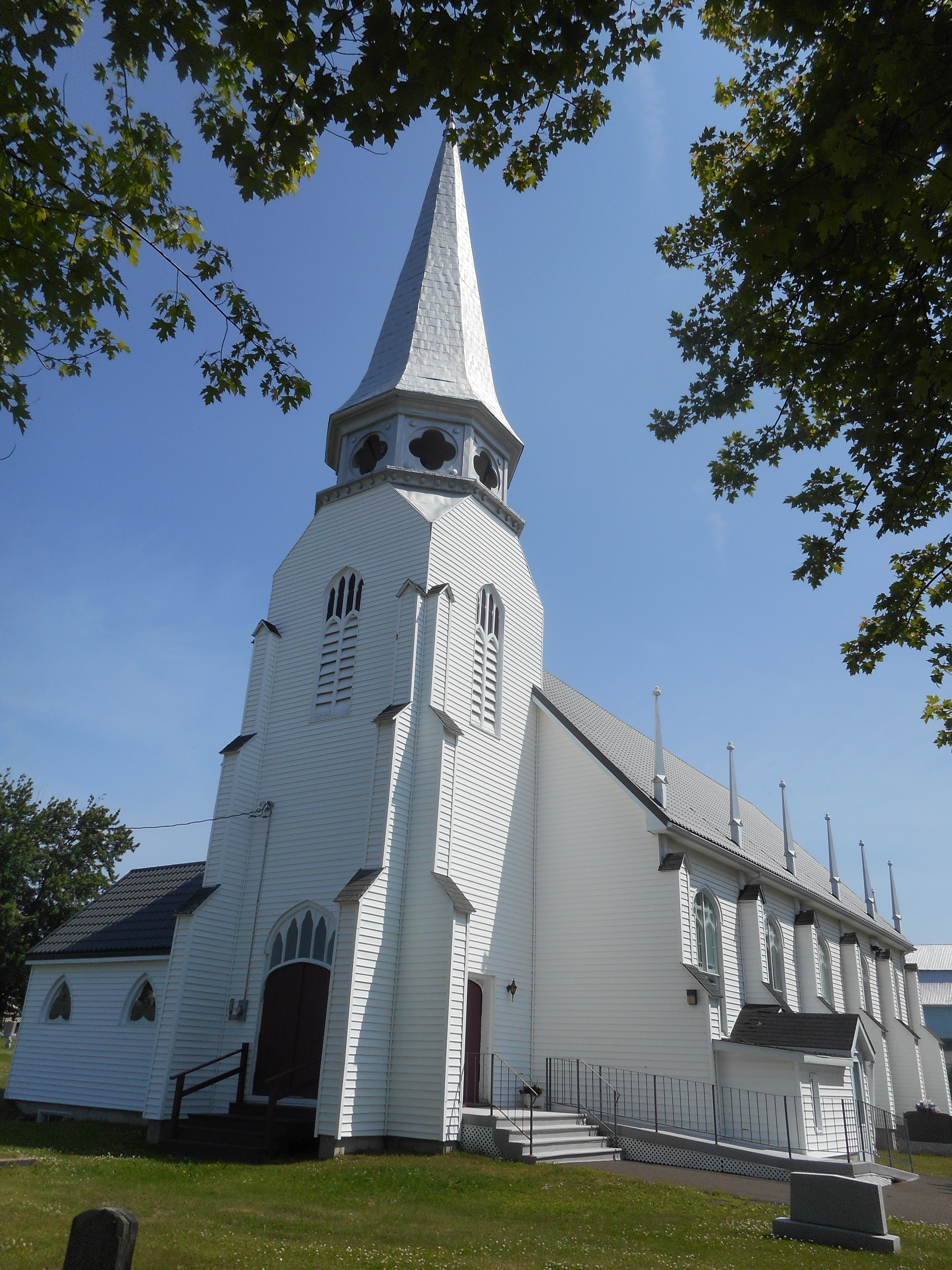 Église Saint-Andrew, boulevard Gérard-D.-Levesque, New Carlisle, Québec